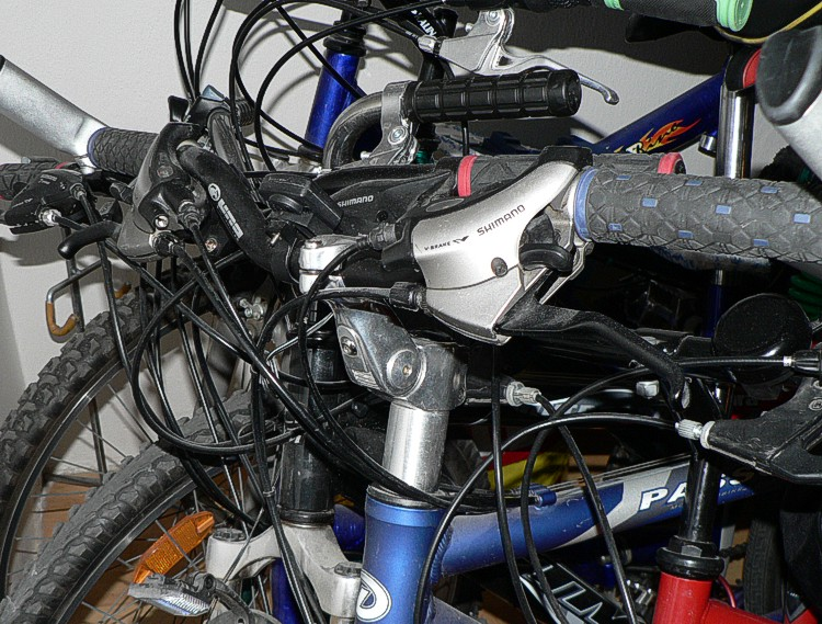 bike bowdens